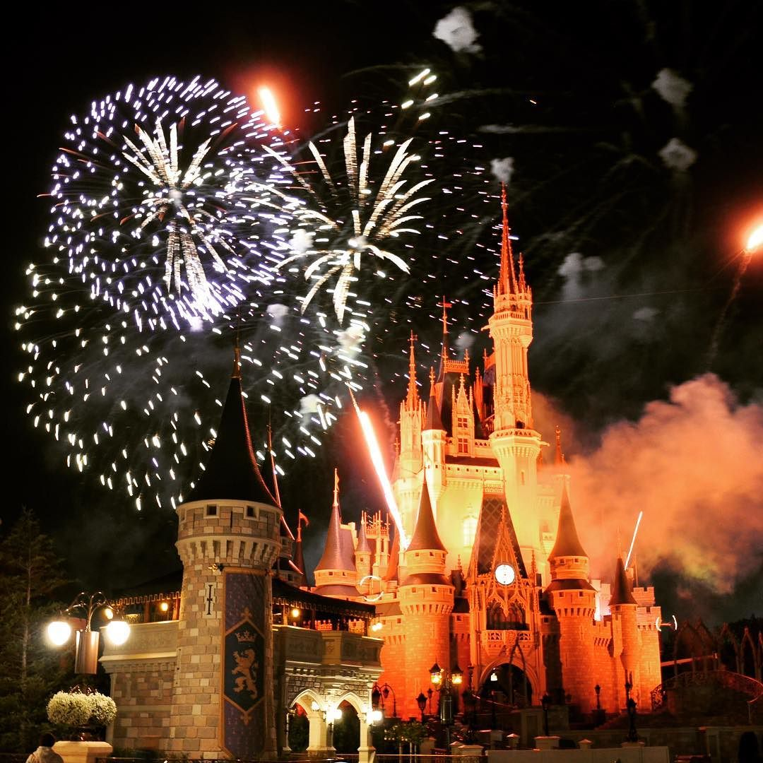 via Instagram ift.tt/1pdzP9S